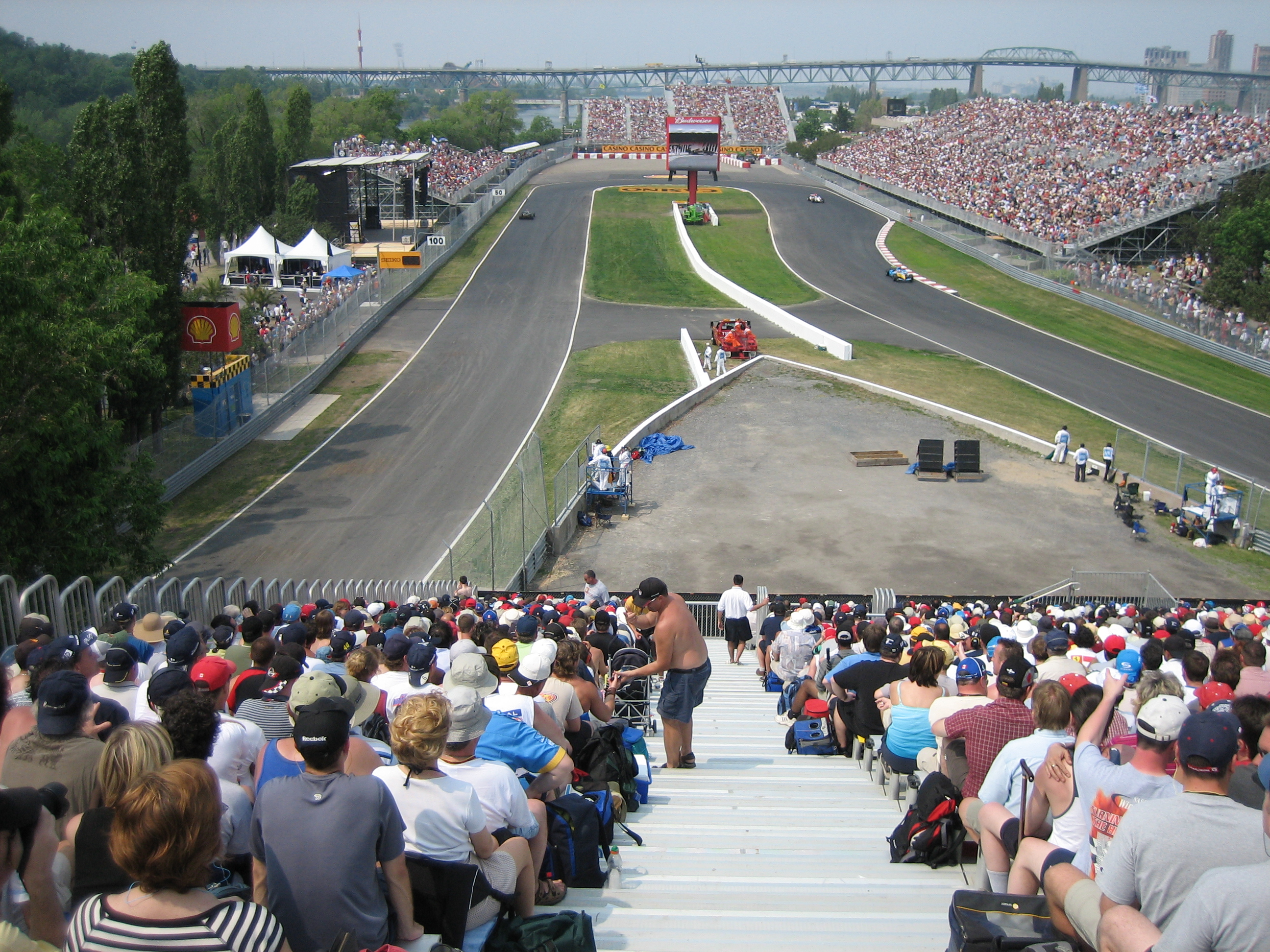 Circuit Gilles Villeneuve Hairpin